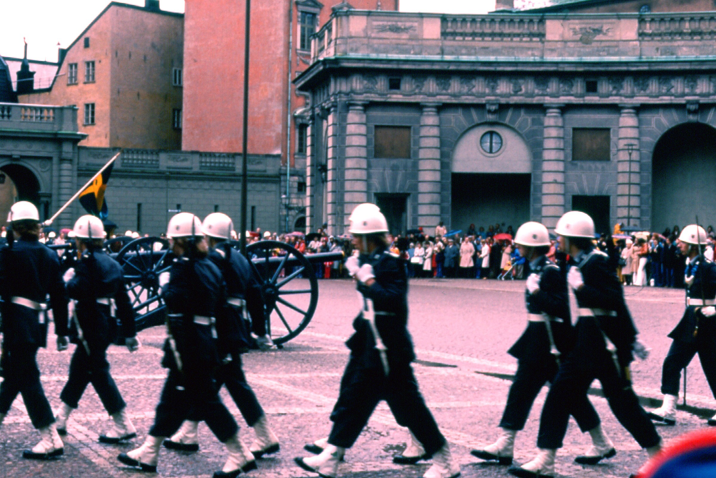 Högvakten i Stockholm, 1976.